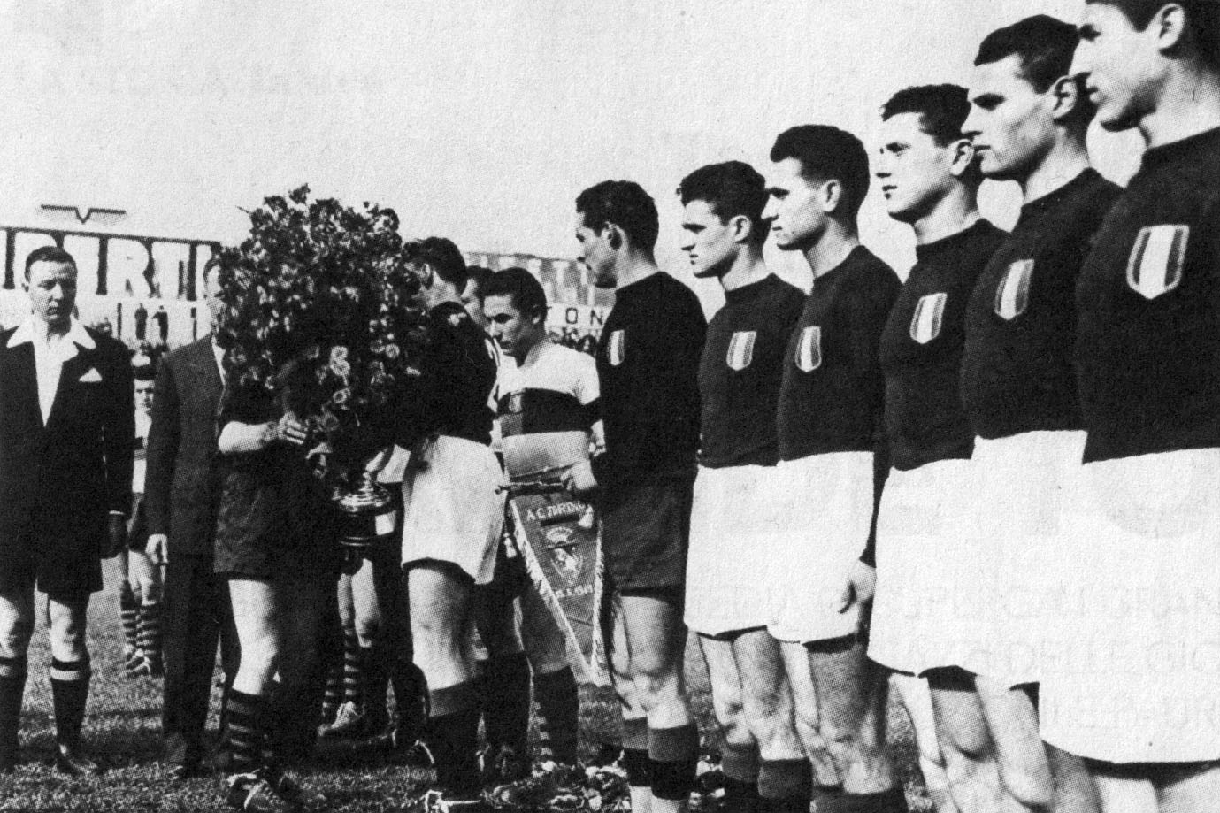 Torino, stadio Filadelfia, 15 maggio 1949. La squadra ragazzi del Torino, in campo undici giorni dopo la tragedia di Superga in cui perì il Grande Torino, nei convenevoli di rito prima dell'inizio della sfida contro il Genoa (anch'esso nell'occasione in campo con la sua formazione giovanile) valevole per la 36ª giornata del campionato italiano di Serie A 1948-49 — con il Torino già proclamato campione d'Italia per delibera della FIGC, dopo la sciagura aerea, prima della fine del torneo. I ragazzi granata vinsero 4-0 la partita (A. Giammarinaro 37', G. Marchetto 56 e 86', S. Lussu 80' rig.).